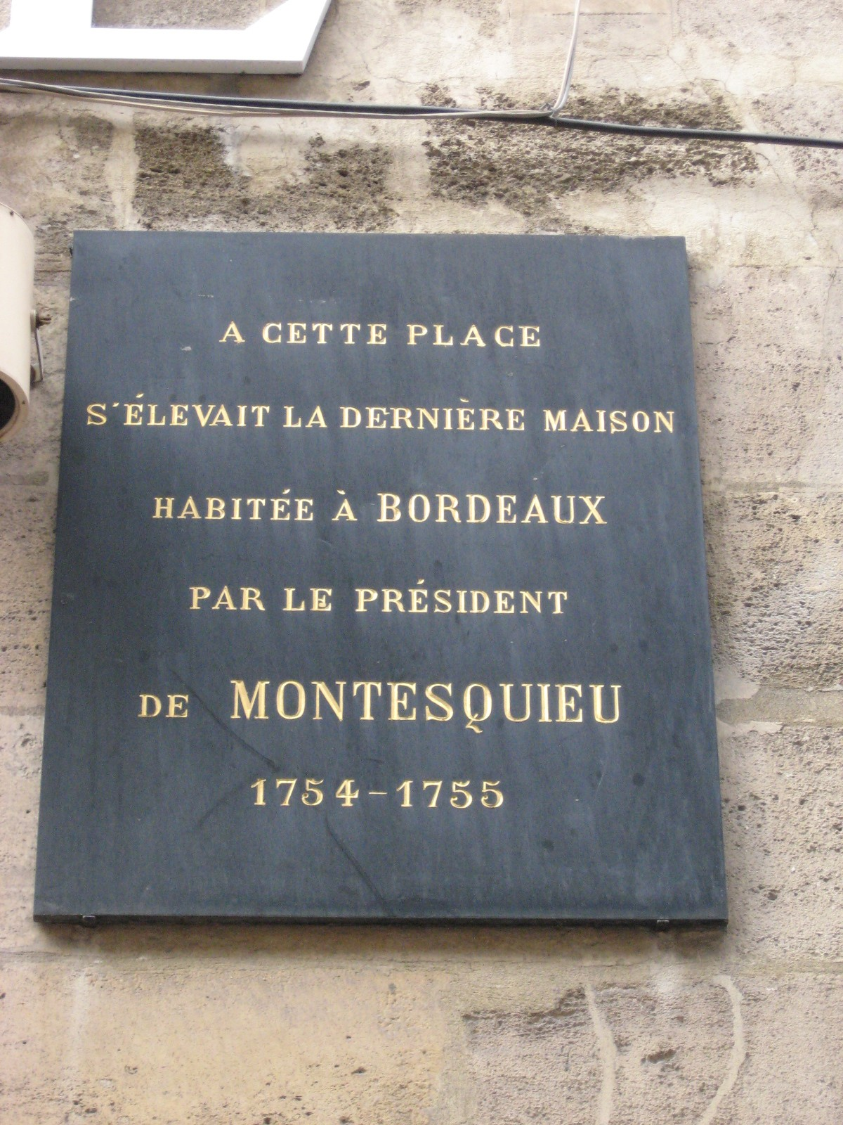 Plaque apposée sur la façade de la librairie Mollat à Bordeaux, France, rue Porte-Dijaux